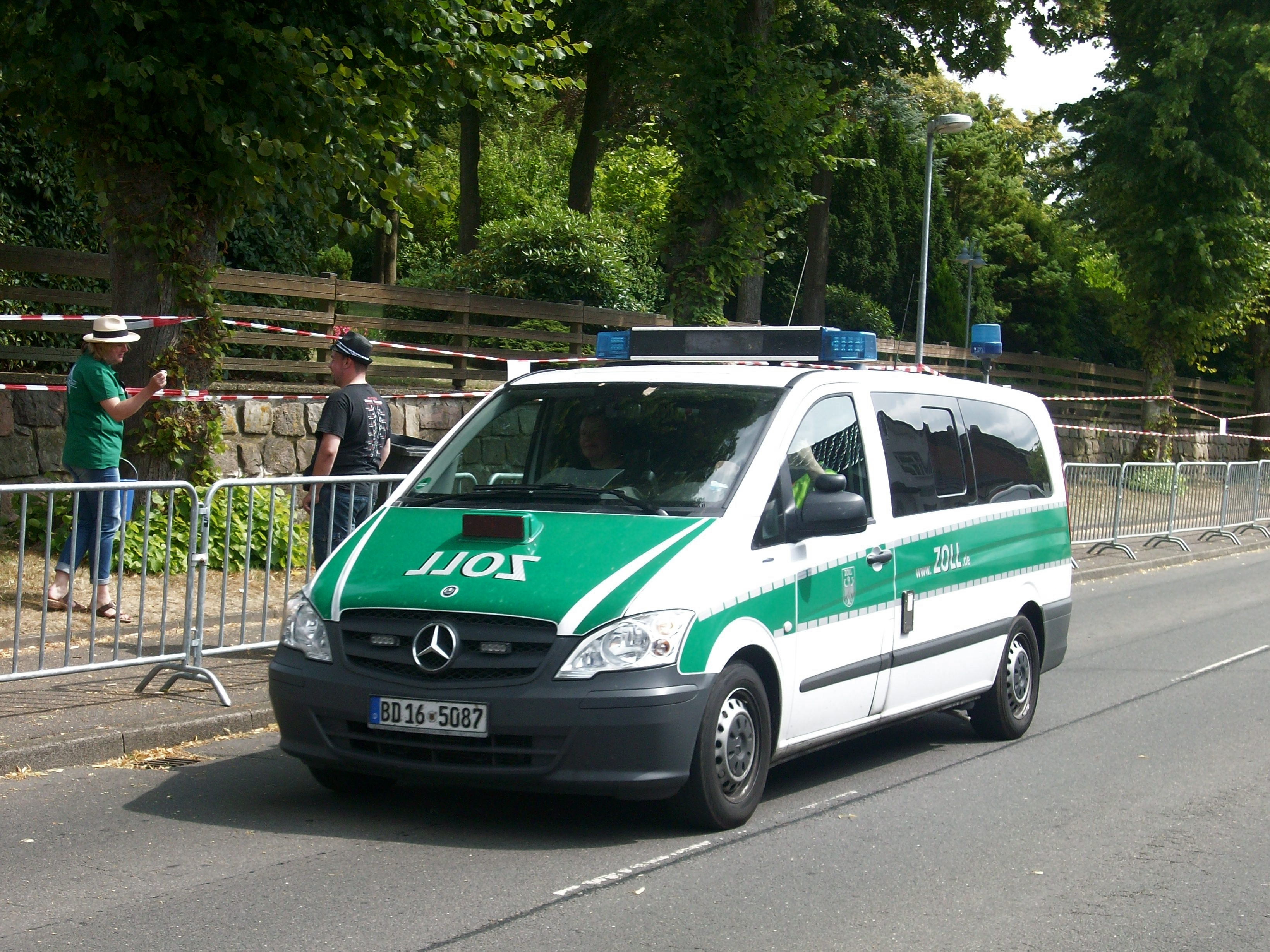 Véhicule de la douane allemande, W.O.A. 2014